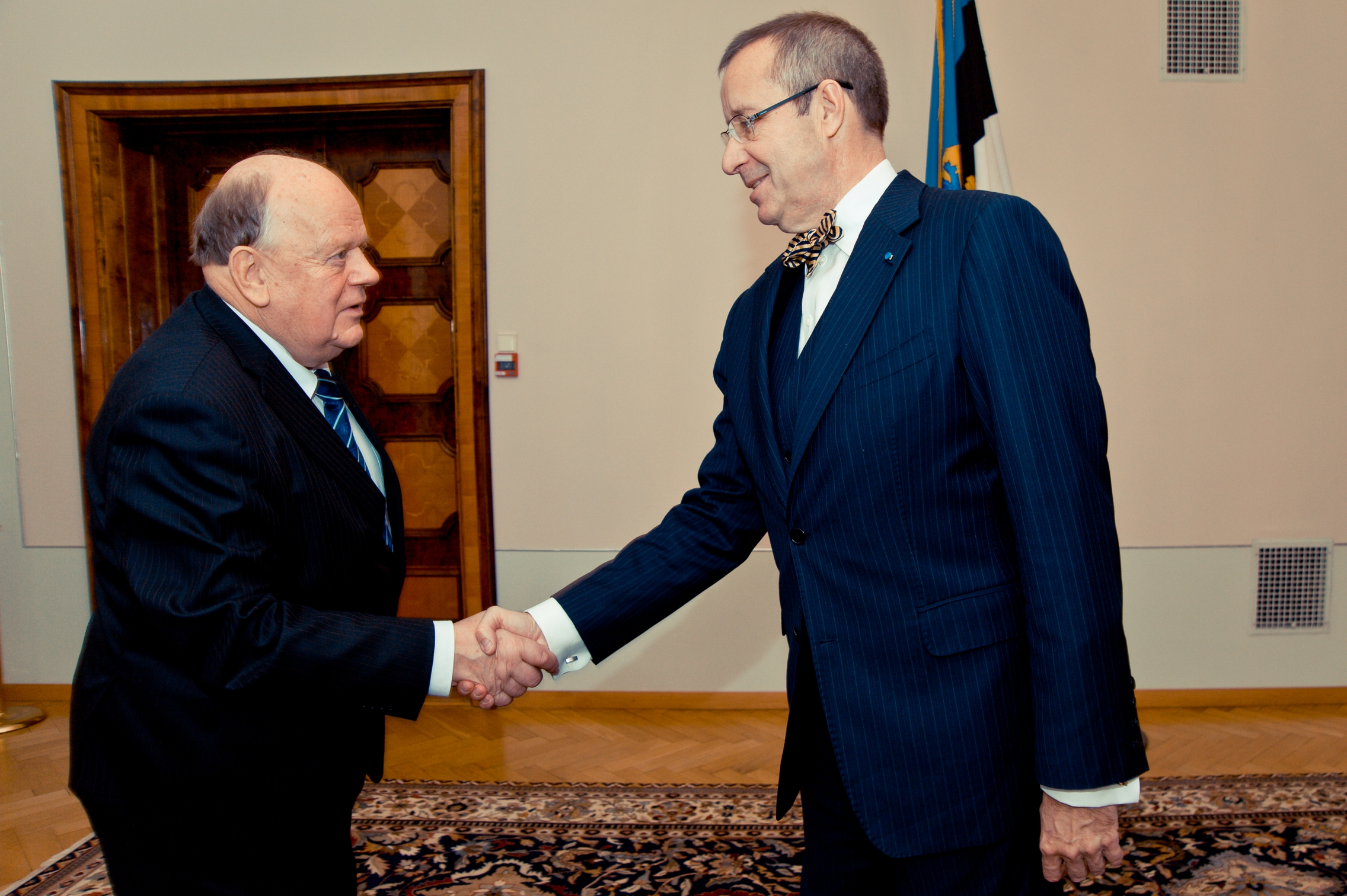 Stanisłaŭ Šuškievič kohtumas Toomas Hendrik Ilvesega.